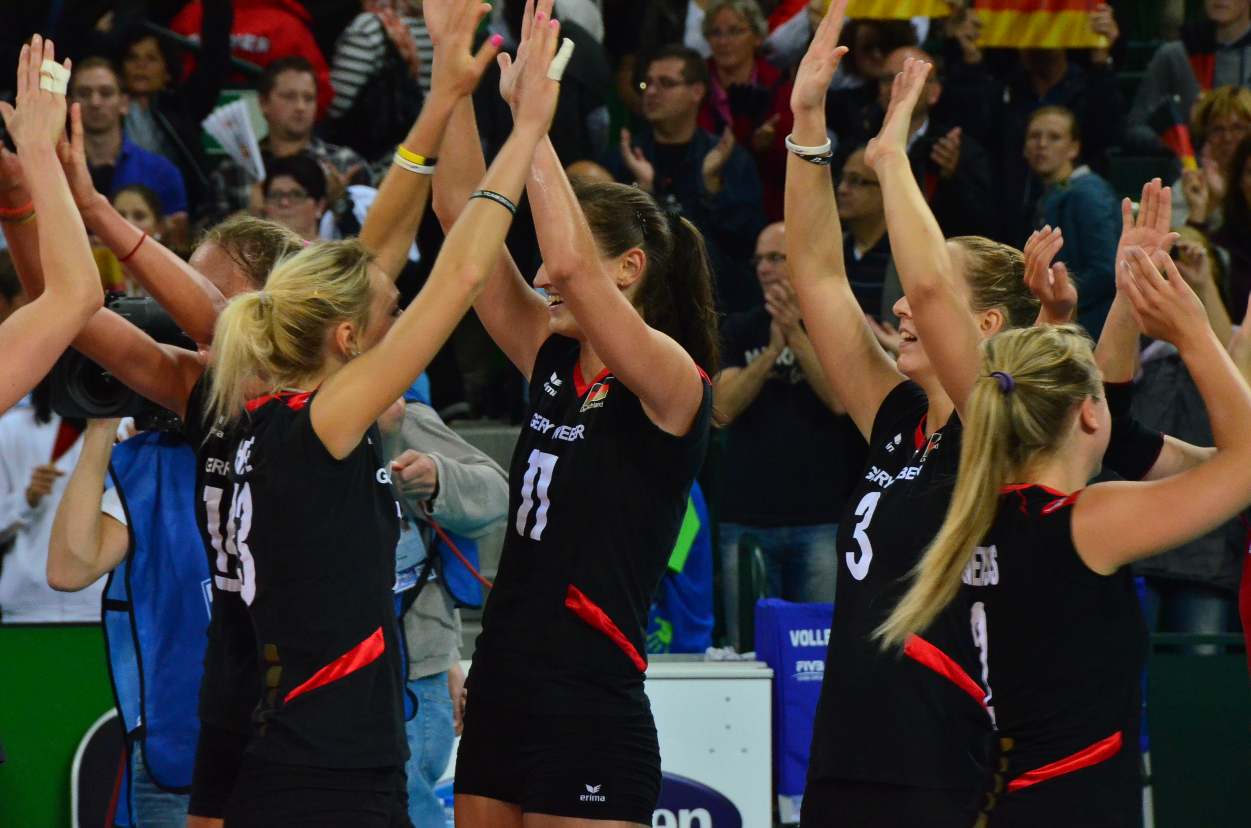 Volleyball-Europameisterschaft der Frauen 2013-Spielort Halle (Westf) Gerry-Weber-Stadion - Spiel 8. September 2013 (Deutschland-Türkei)